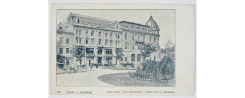 проспект Свободи